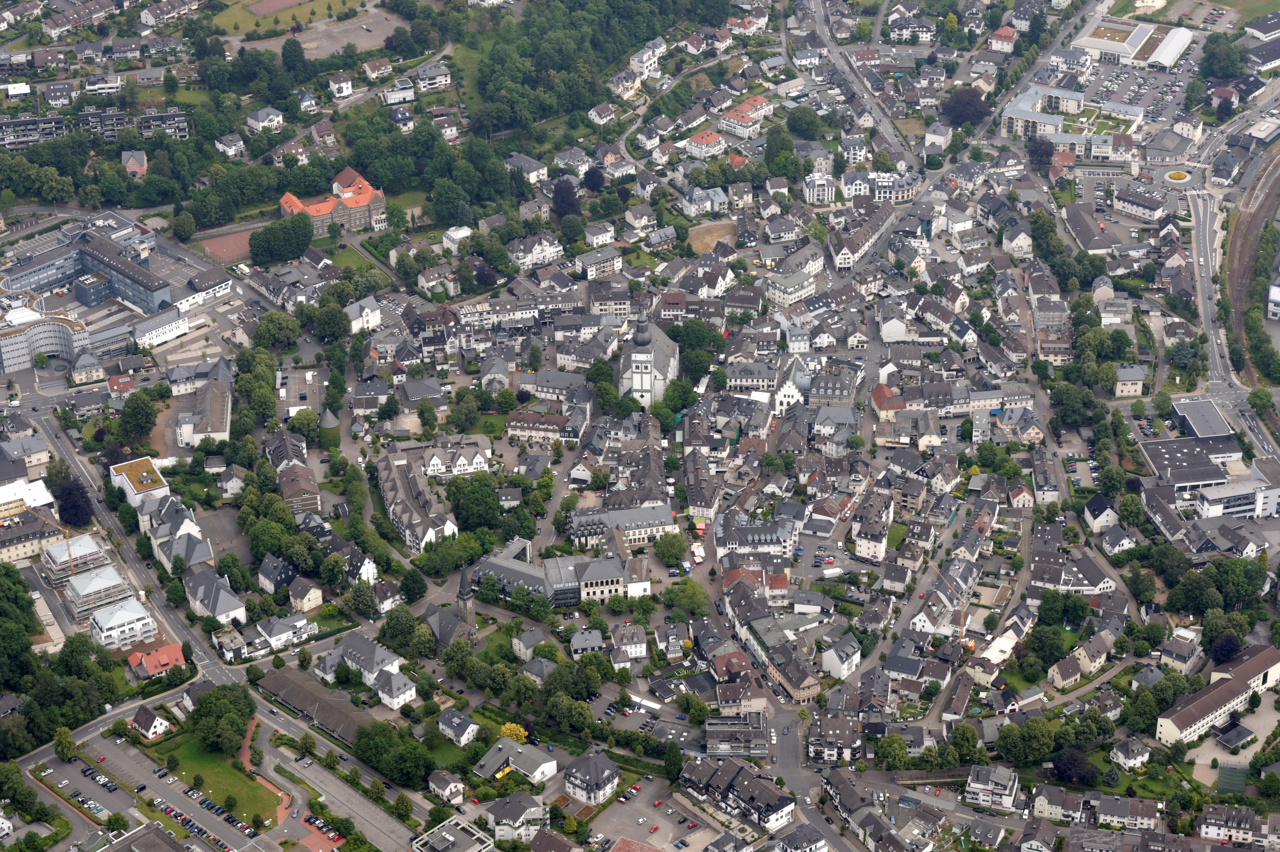 Fotoflug Sauerland Nord. Attendorn, Zentrum mit Pfarrkirche St. Johannes Baptist, links Werksgebäude der Fa. Viega, oben links Collegium Bernadinum, rechts Attendorner Bahnhof, Landesstraßen 539 und 657, Blickrichtung Nordost The making of this document was supported by the Community-Budget of Wikimedia Germany.